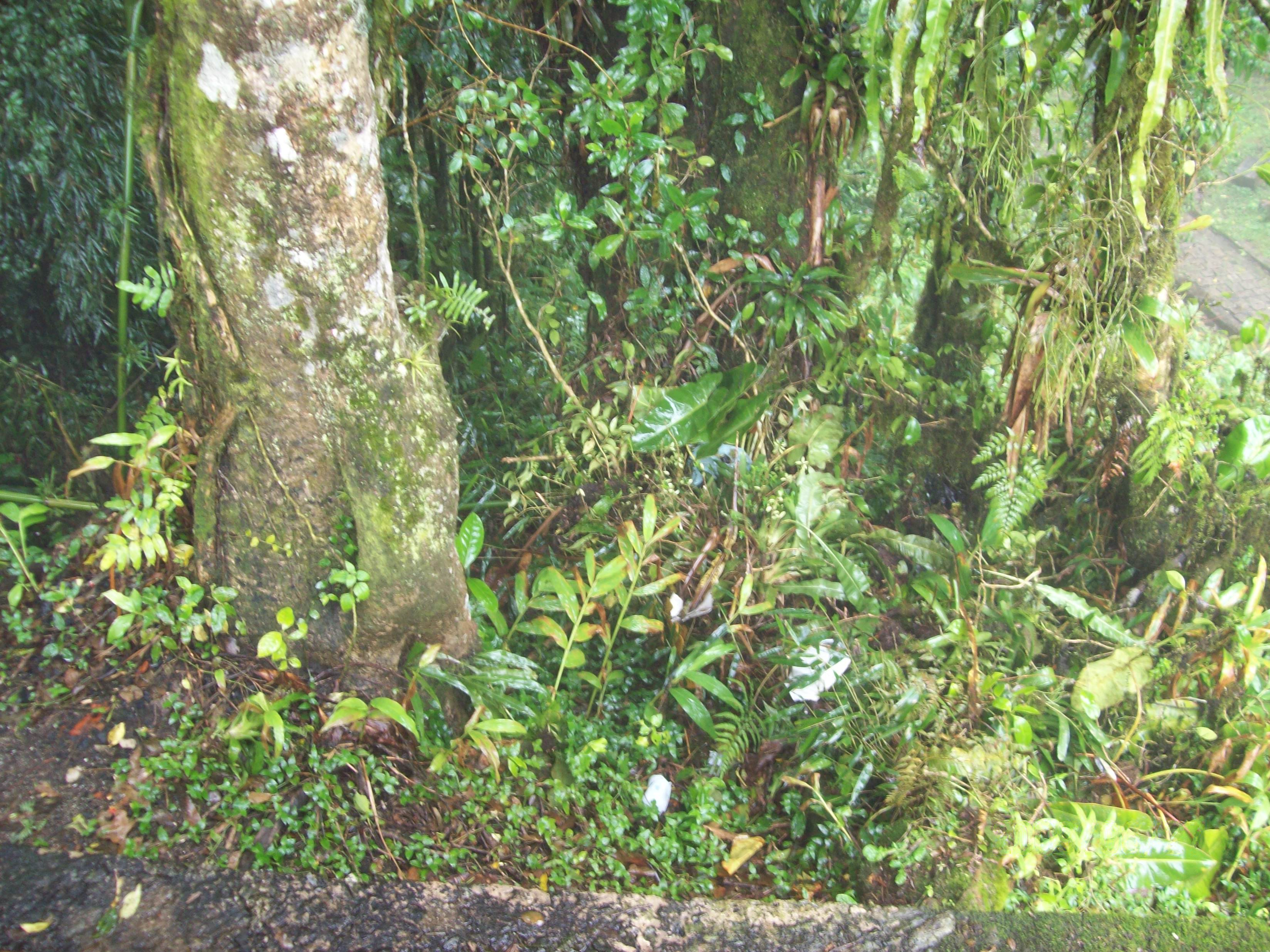 Serra da Graciosa Mata Atlântica